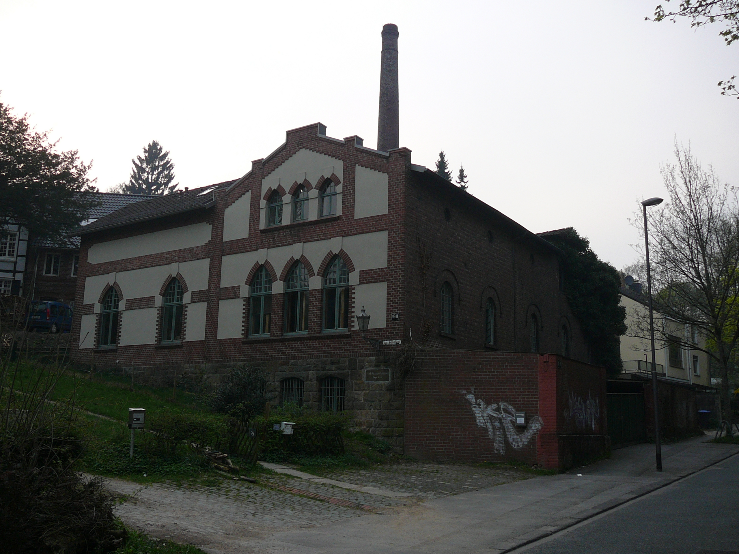 Funckstraße, Wuppertal